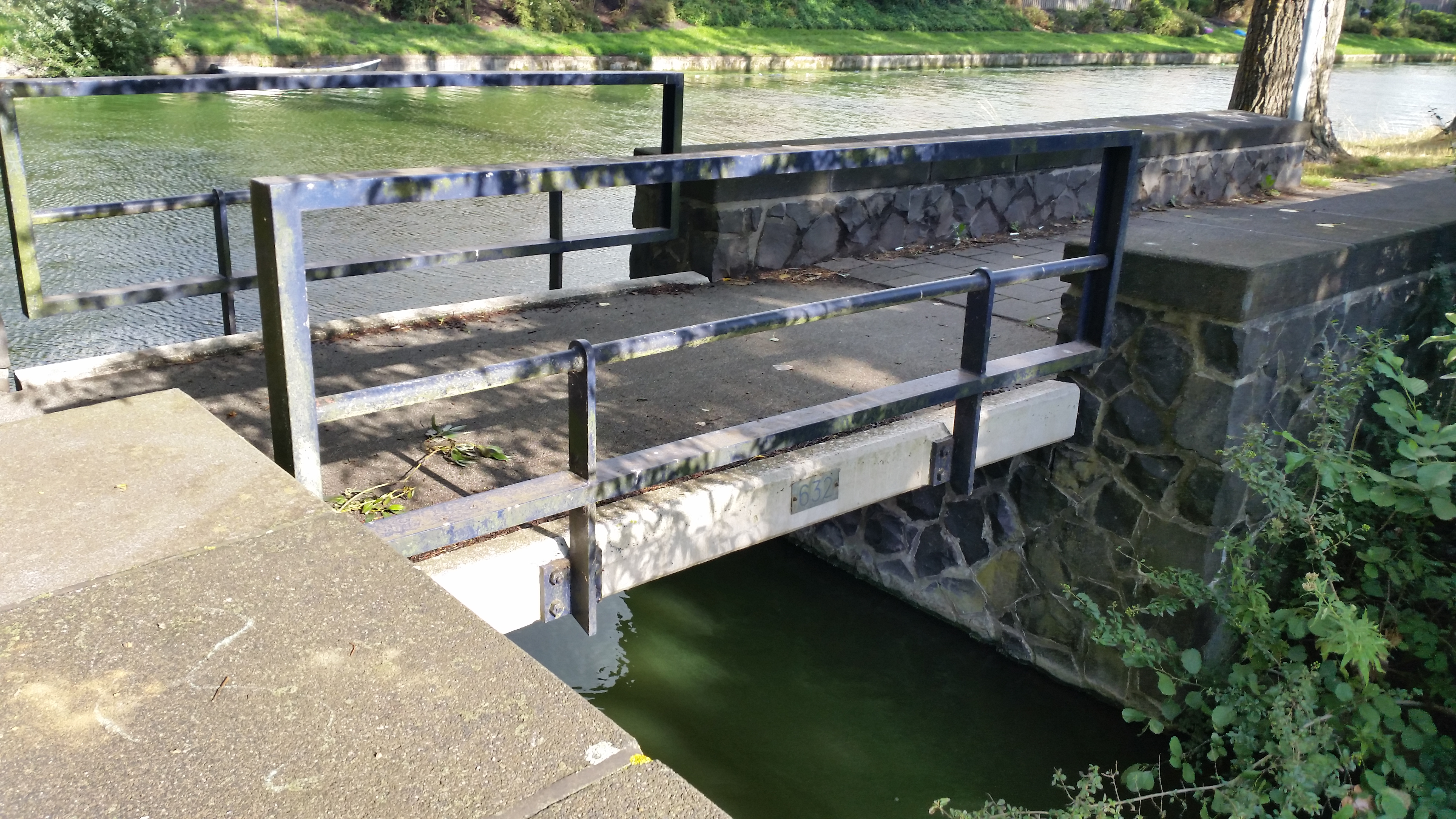 Brug 632 (in Amsterdam); het bruggetje